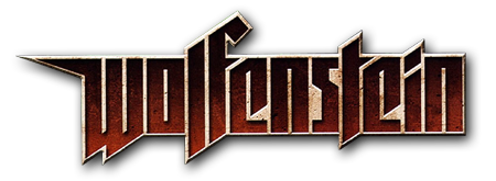 Logo des Computerspiels Wolfenstein von Activision